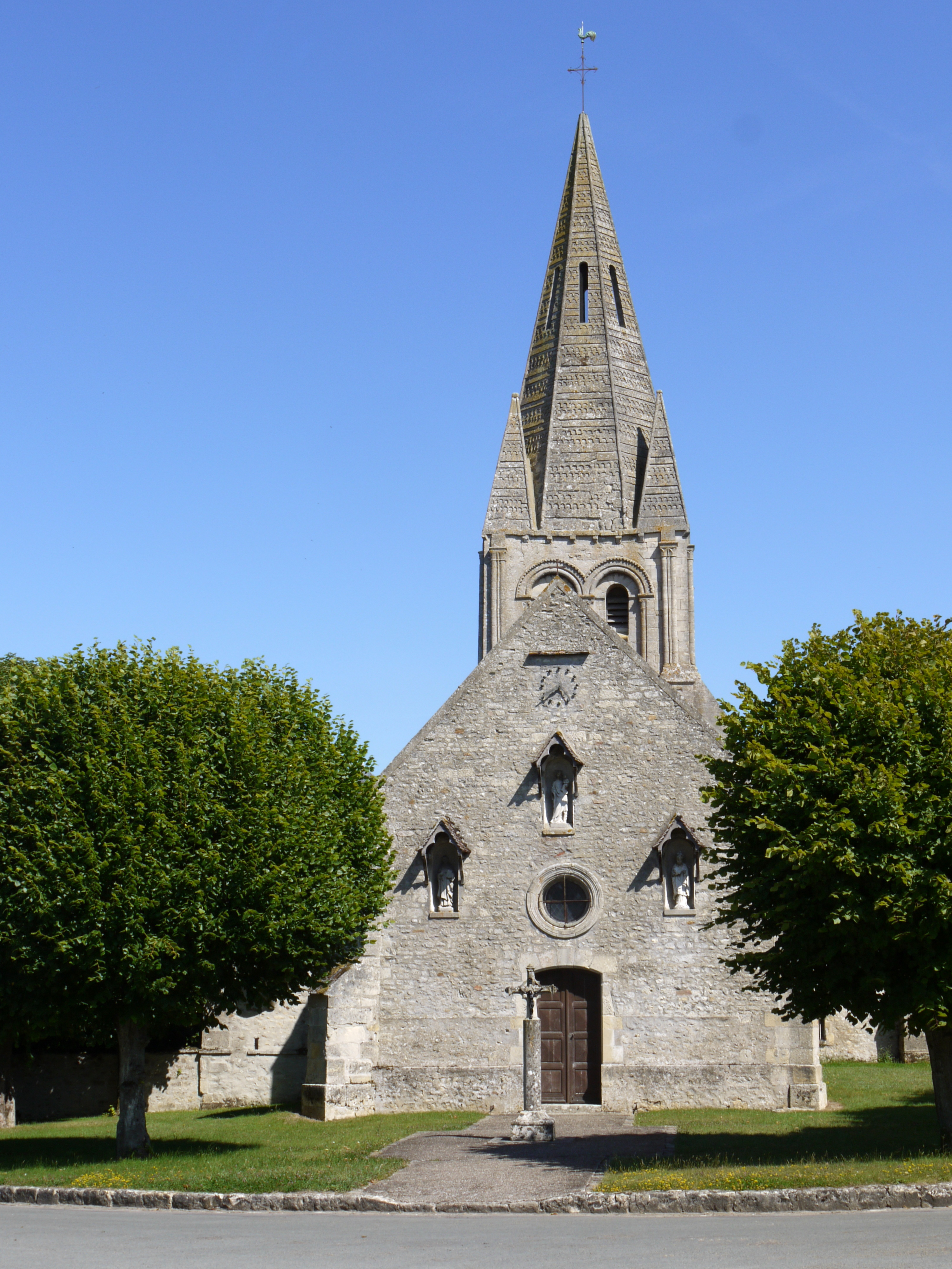 Église de Gadancourt, Val d'Oise, France